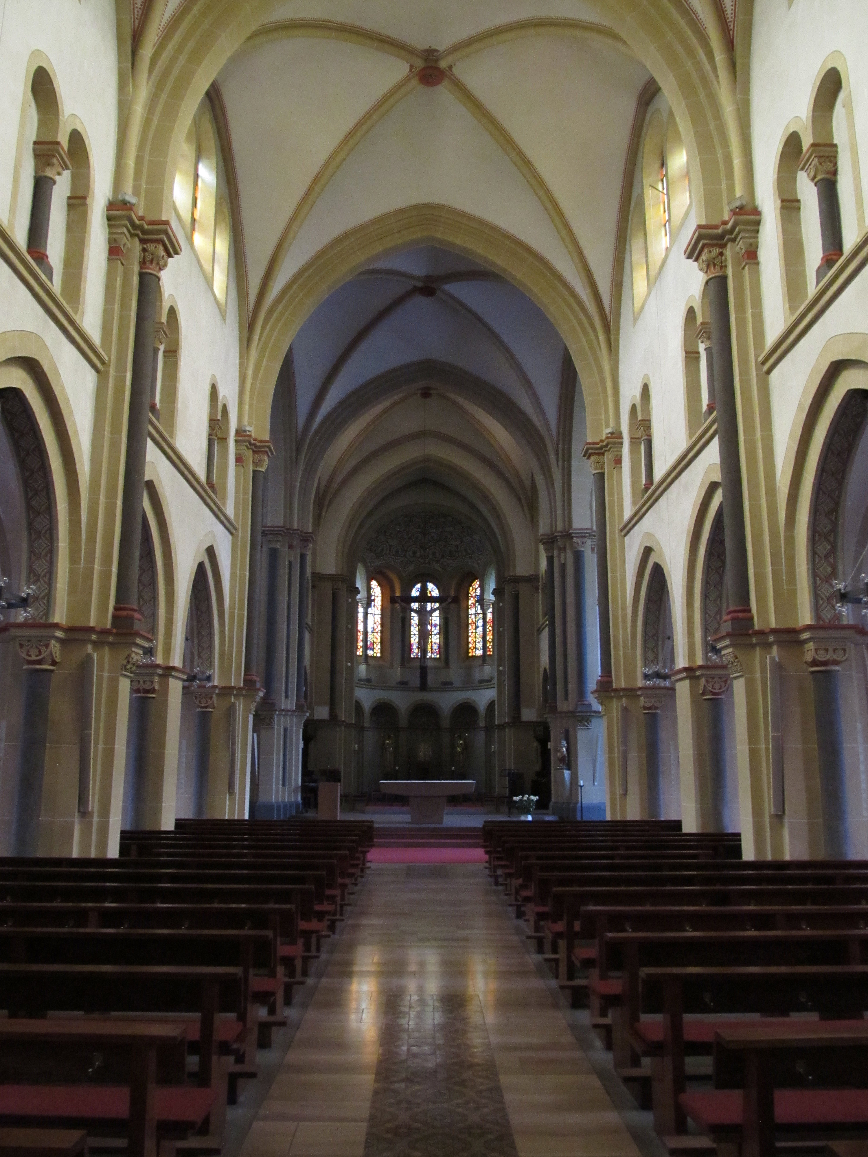 Blick ins Innere der katholischen Pfarrkirche St. Marien in Neunkirchen, Saarland